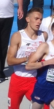 Młodzieżowe Mistrzostwa Europy w Lekkoatletyce U23 w Bydgoszczy 13-16 lipca 2017, kwalifikacje biegu na 1500 m mężczyzn